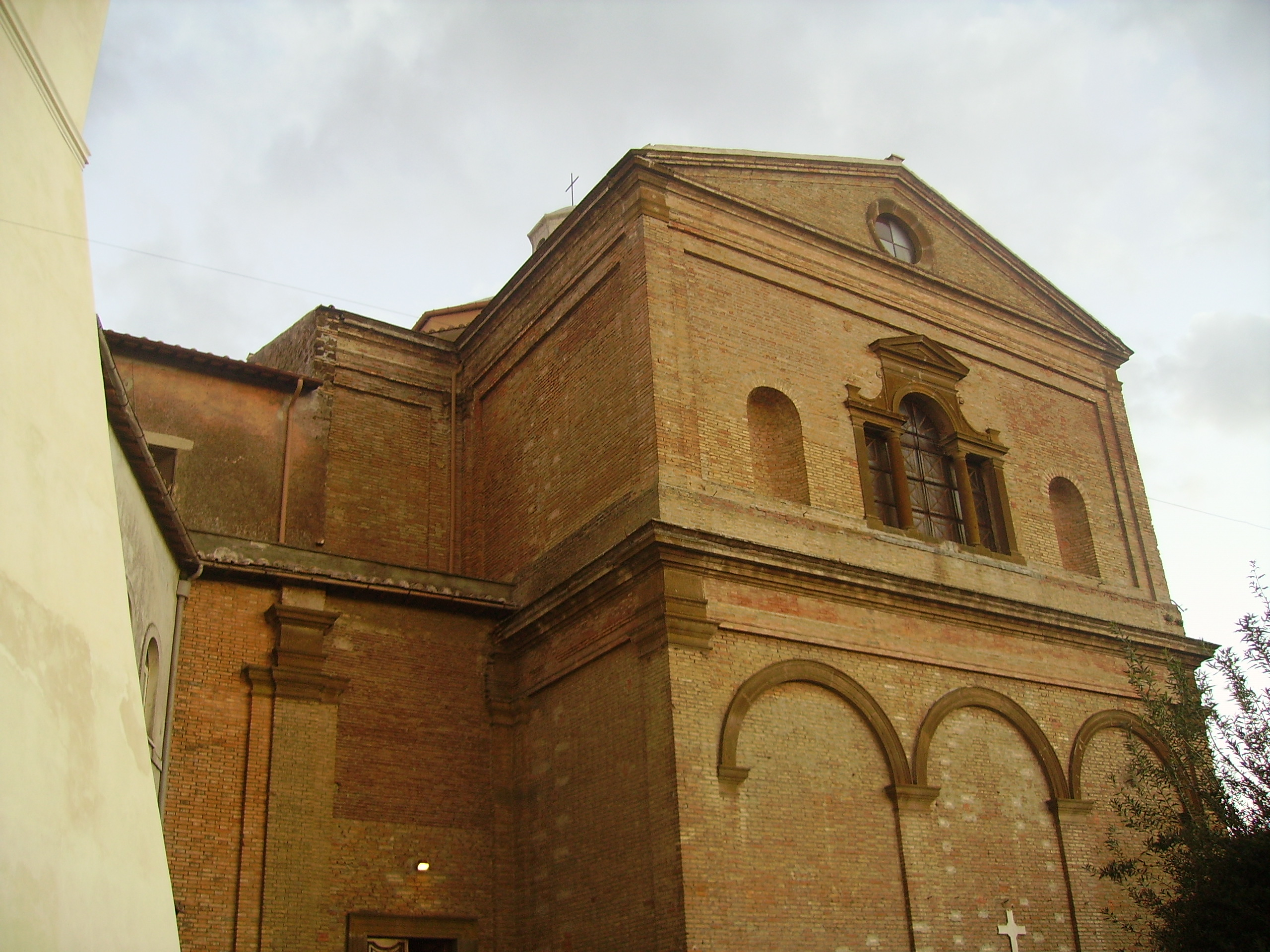 Abside della Parrocchiale dell'Assunta di Monte Compatri